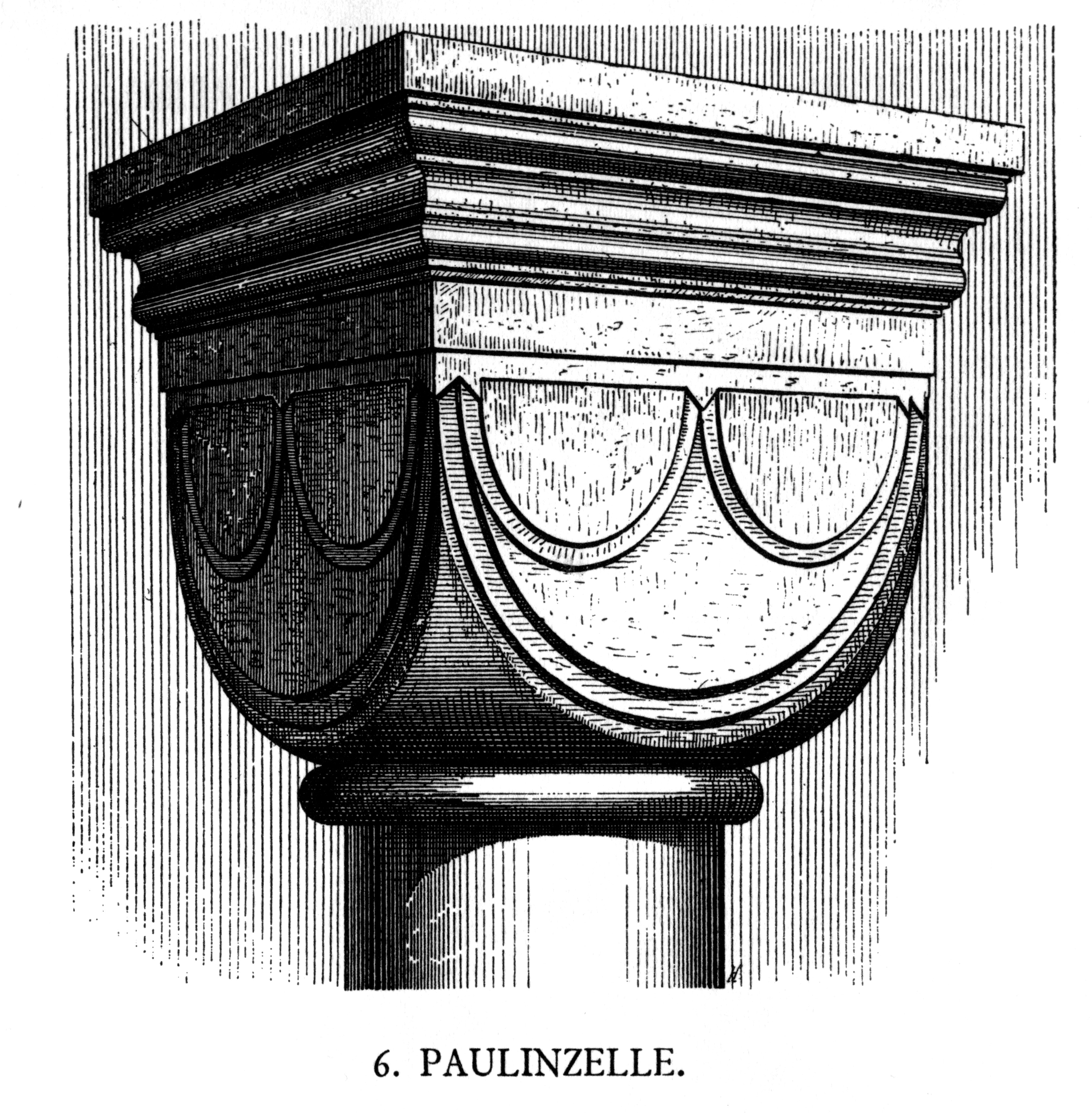 Paulinzelle, capital.